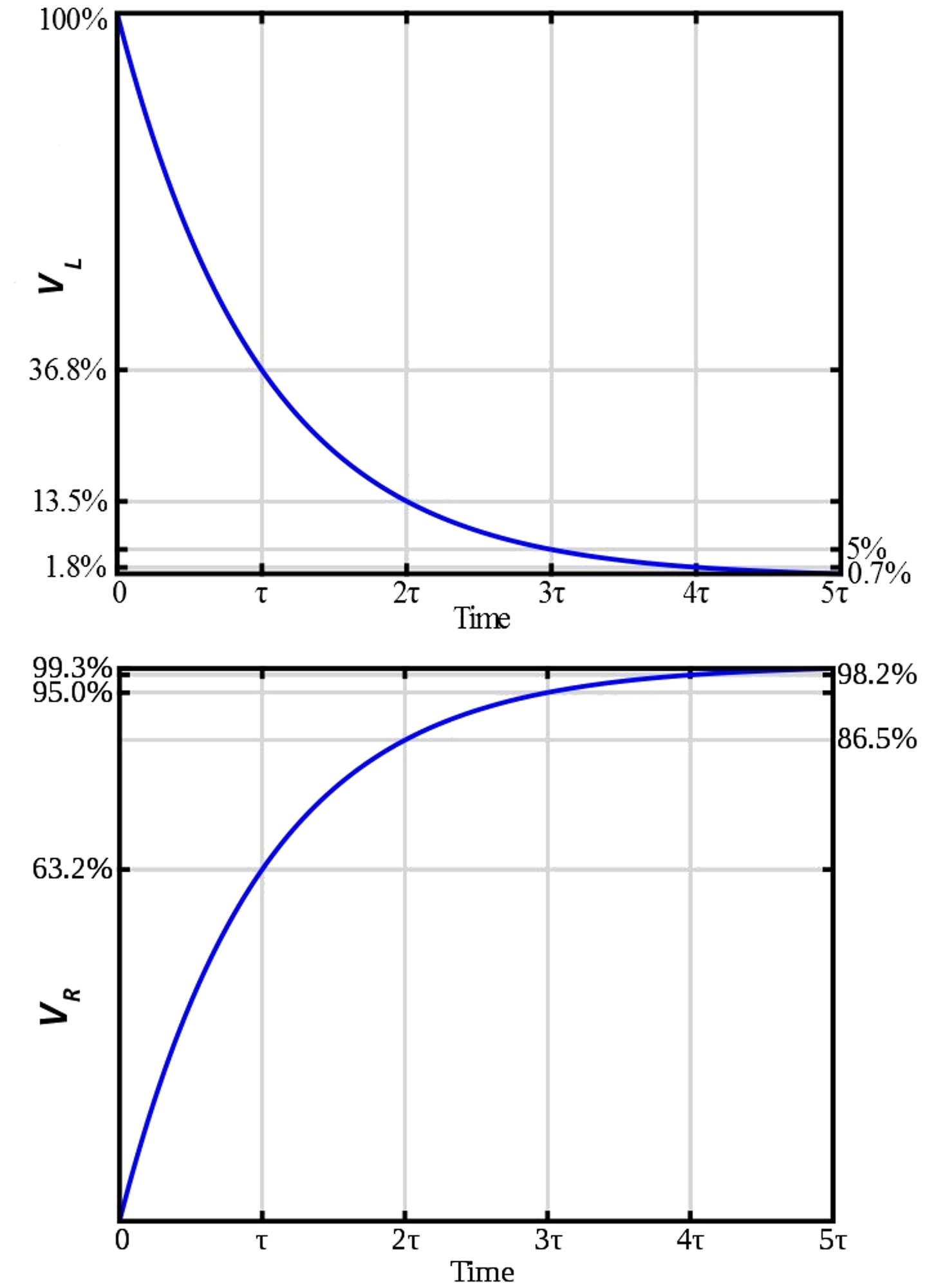 LR цепь: Первый график - зависимость падения напряжения на катушке L от времени. Второй - зависимость падения напряжения на сопротивлении R от времени.